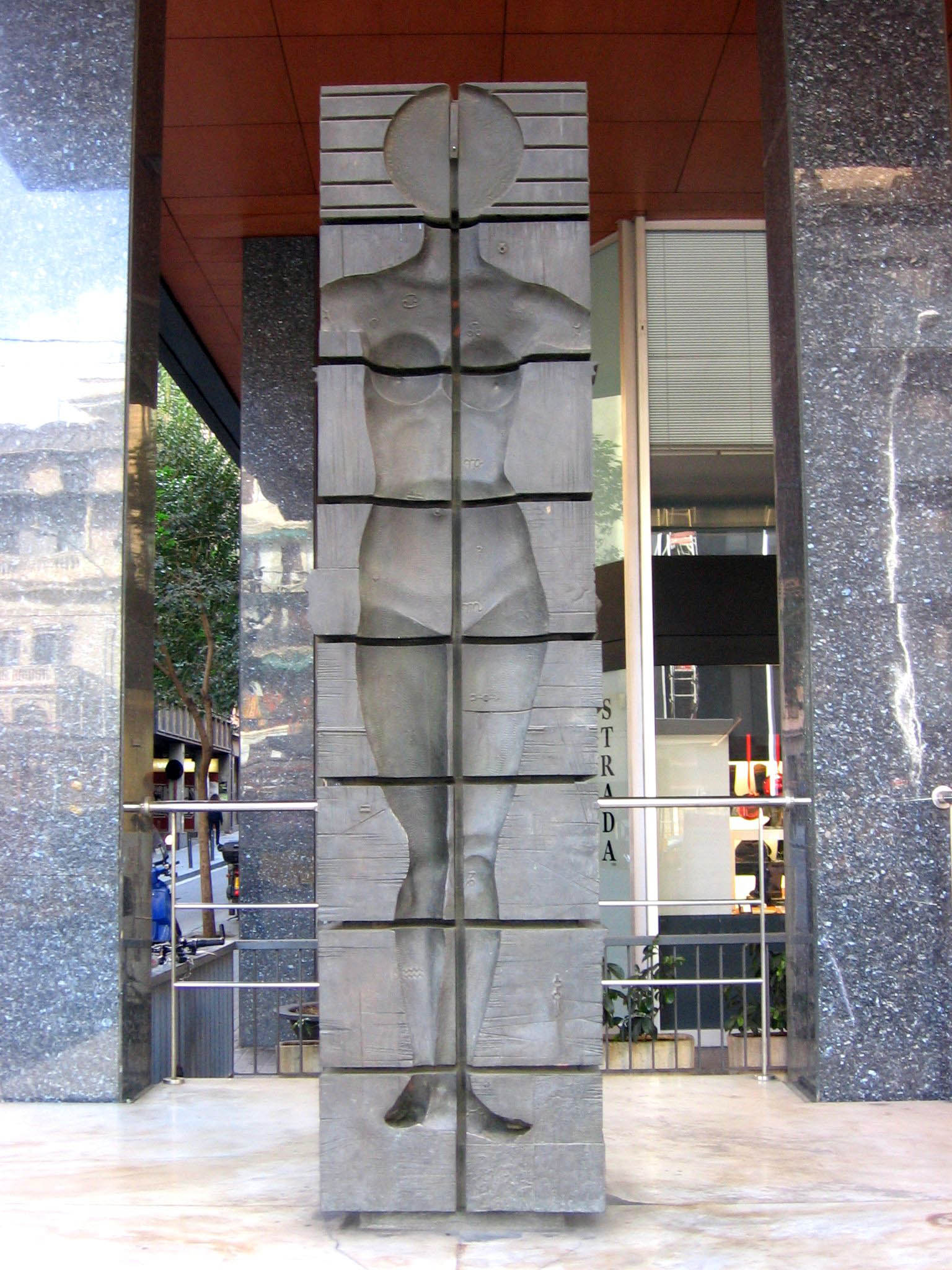 Medida del espacio-tiempo, de Josep Maria Subirachs, Via Augusta, Barcelona.